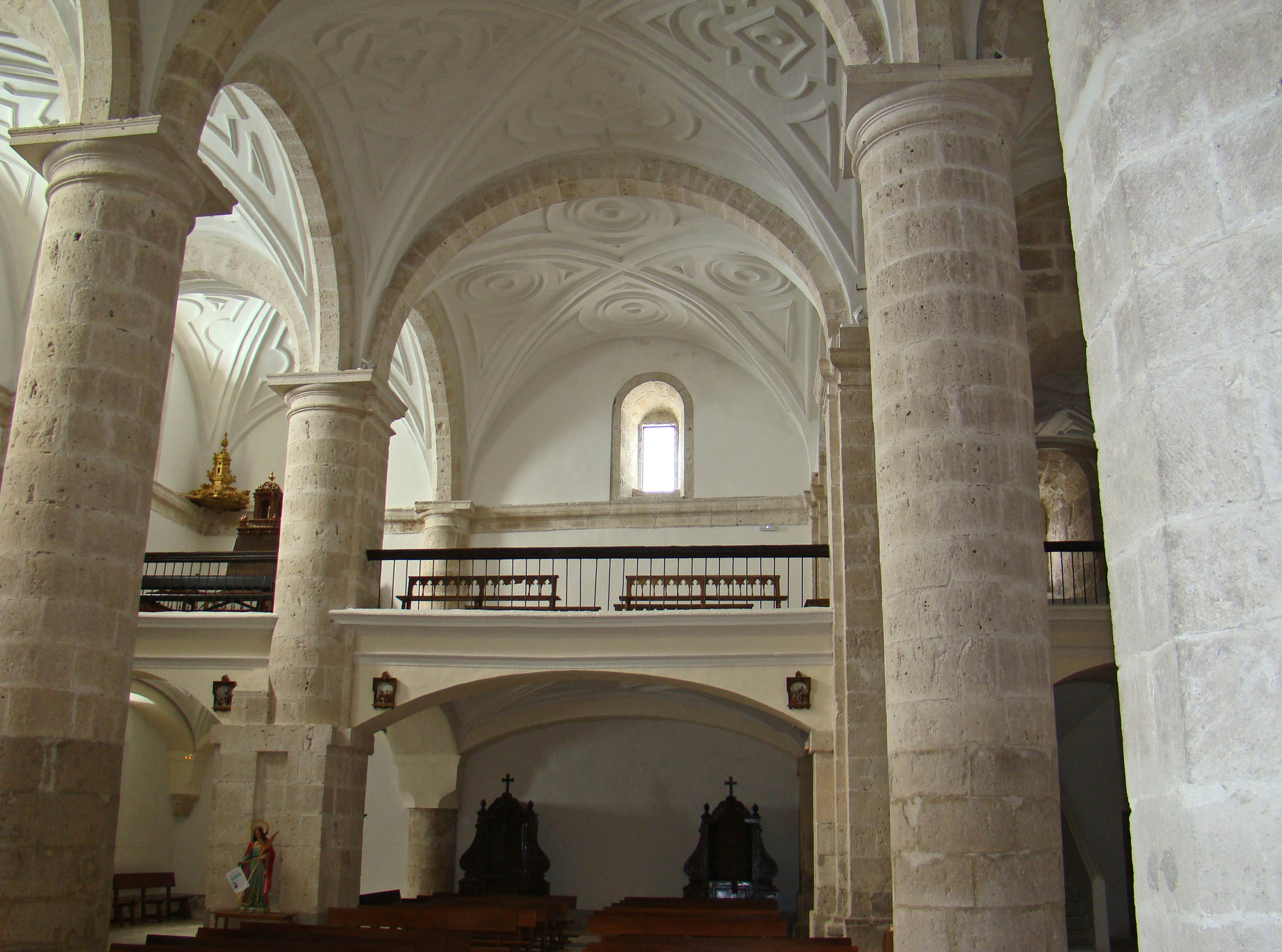 Iglesia de San Juan Bautista en la localidad de Arrabal de Portillo (Valladolid, España). Bóvedas de la iglesia y coro alto a los pies.